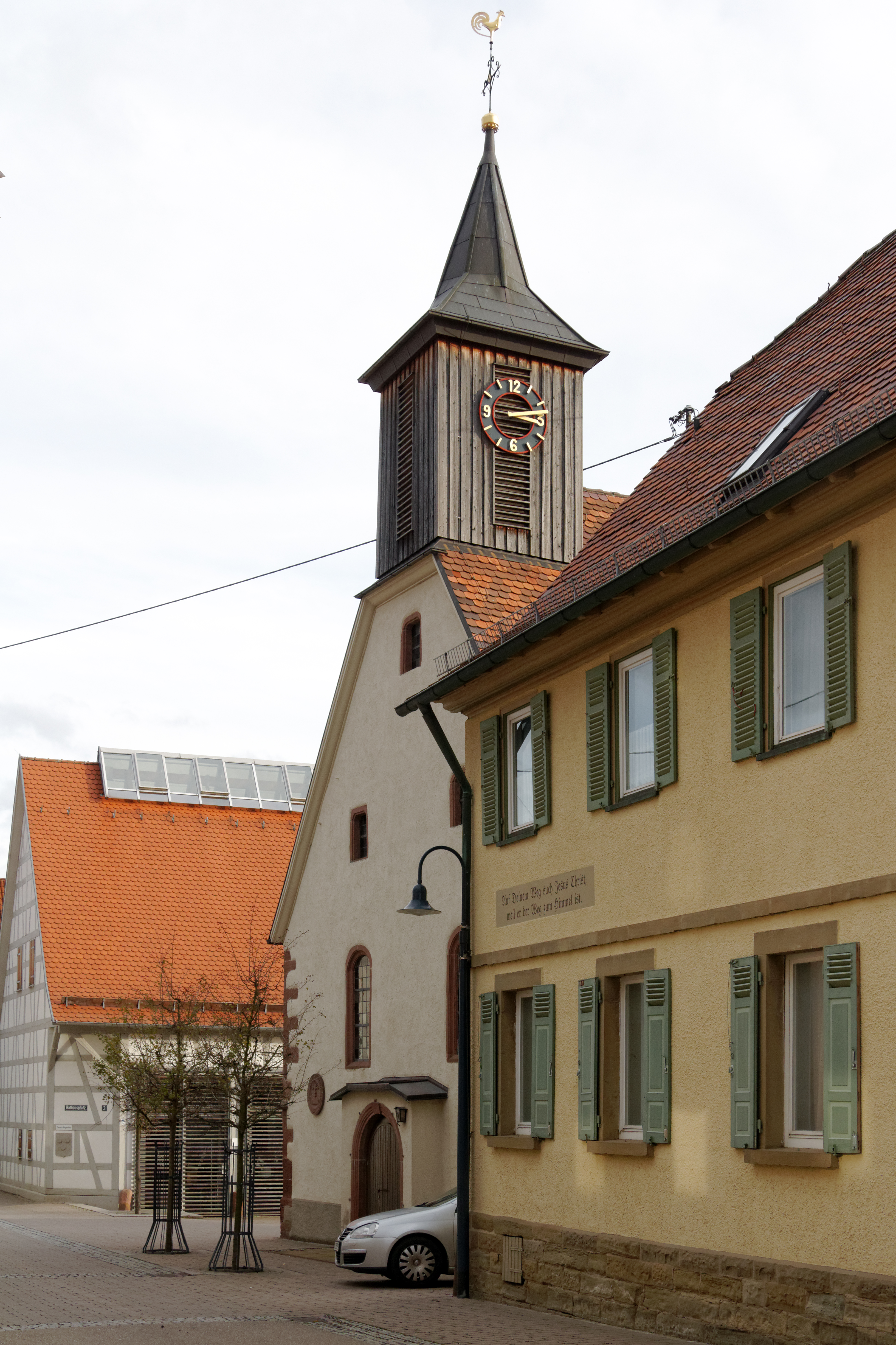 Evangelische Kirche und Gemeindehaus in Perouse, einem Stadtteil von Rutesheim (Baden-Württemberg).